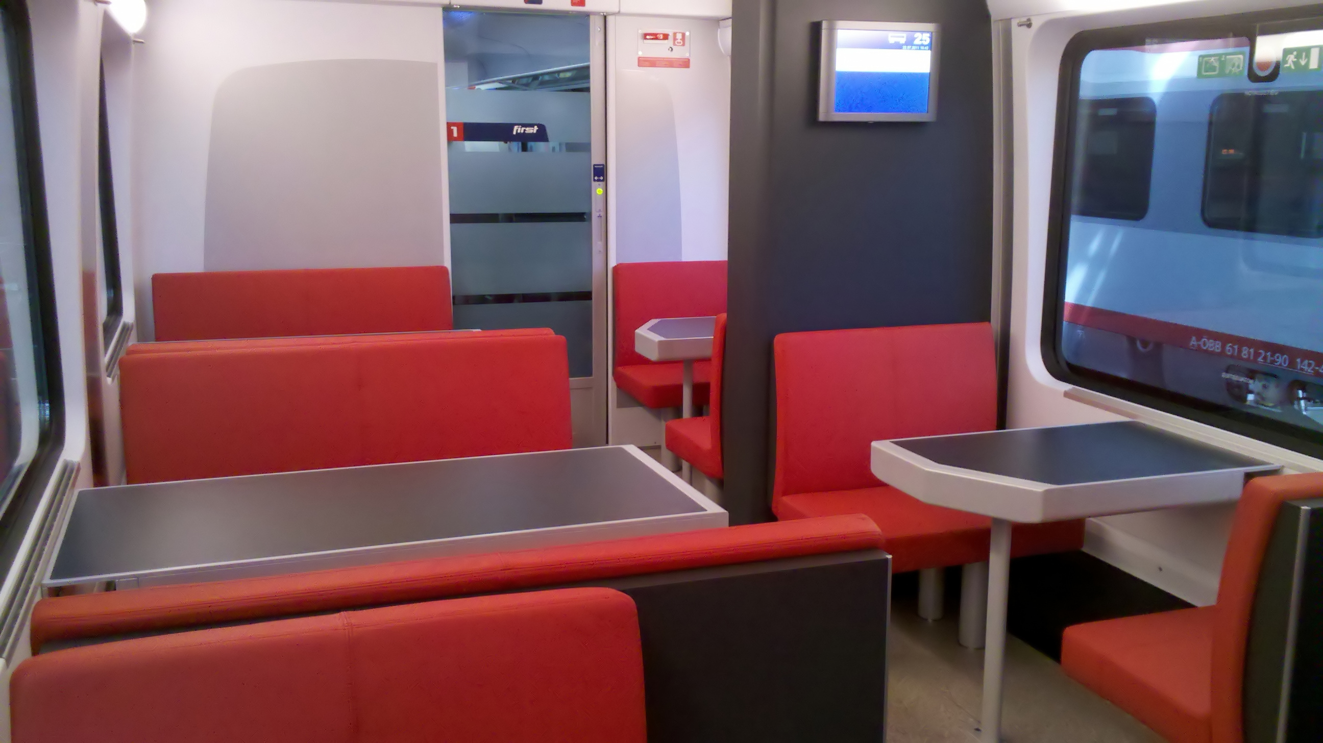 Neues Bistro im Railjet